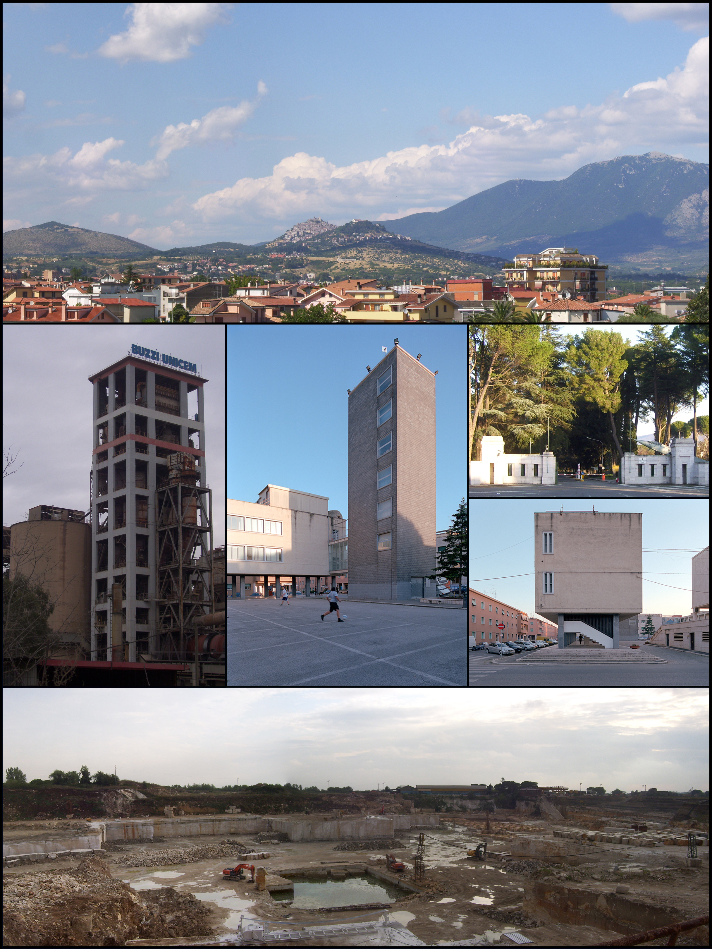 Collage di varie foto di Guidonia Montecelio